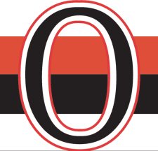 Logo der Ottawa Senators (1893–1934)